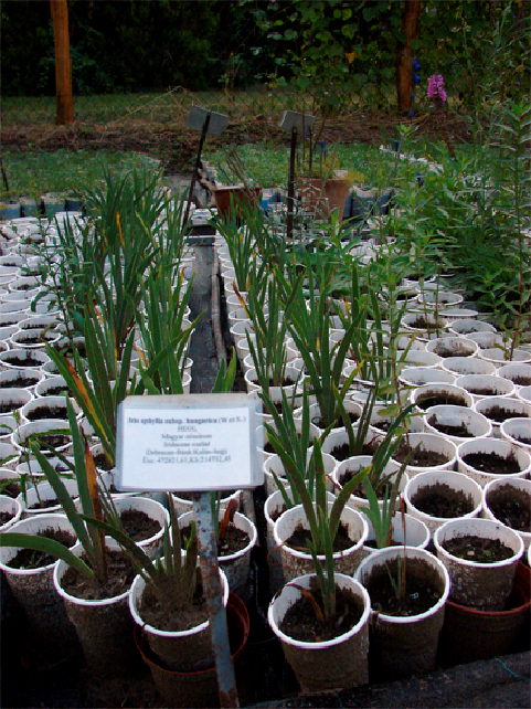 magyar kökörcsinek Debrecenben